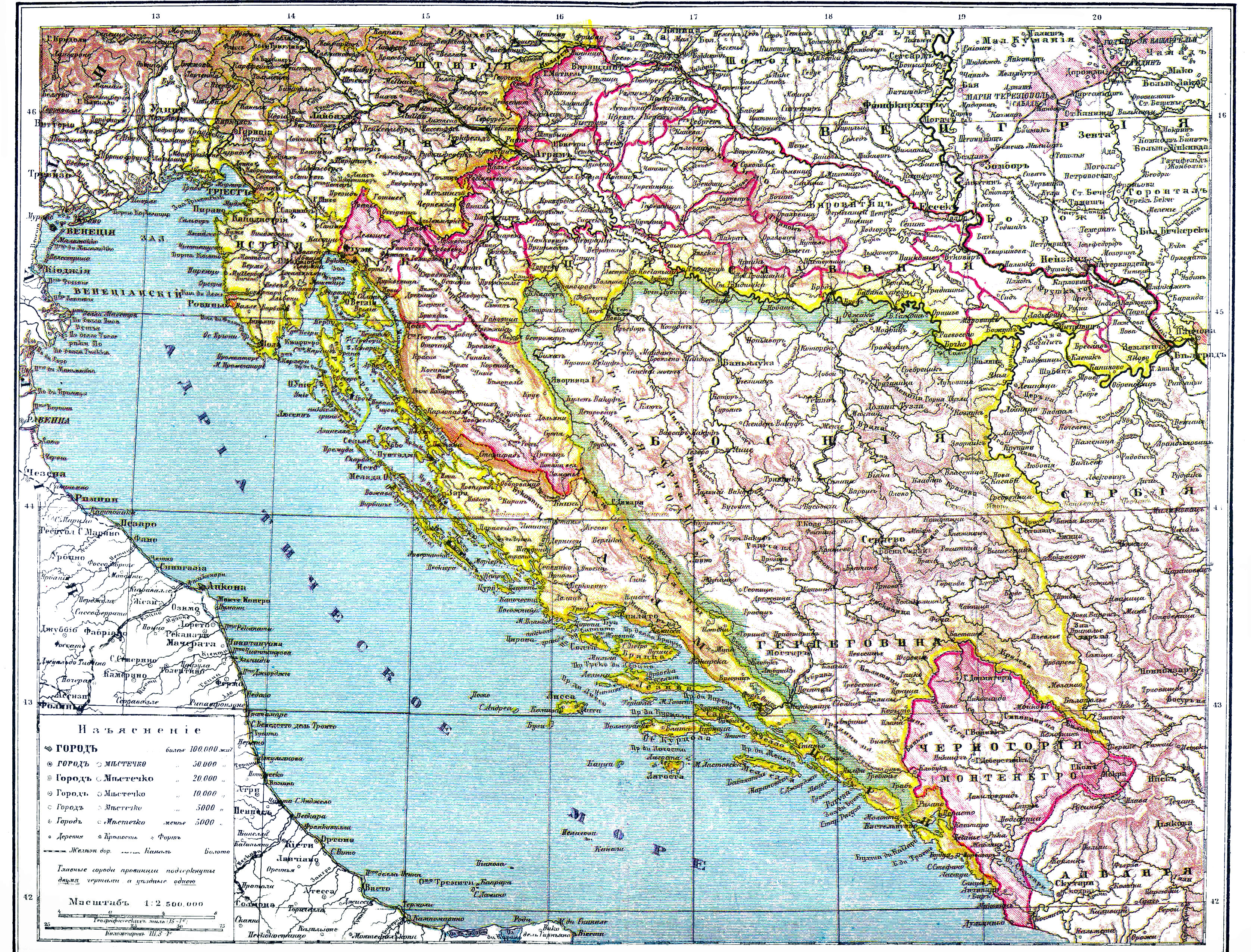 Австрийское побережье, Далмация, Кроация, Славония и Босния. Данное изображение используется в статье Австрия или Австрийская монархия. Иллюстрация из энциклопедического словаря Брокгауза и Ефрона (1890—1907). Примечание. Описания изображений были загружены автоматически, возможны неточности. Рекомендуется проверять.